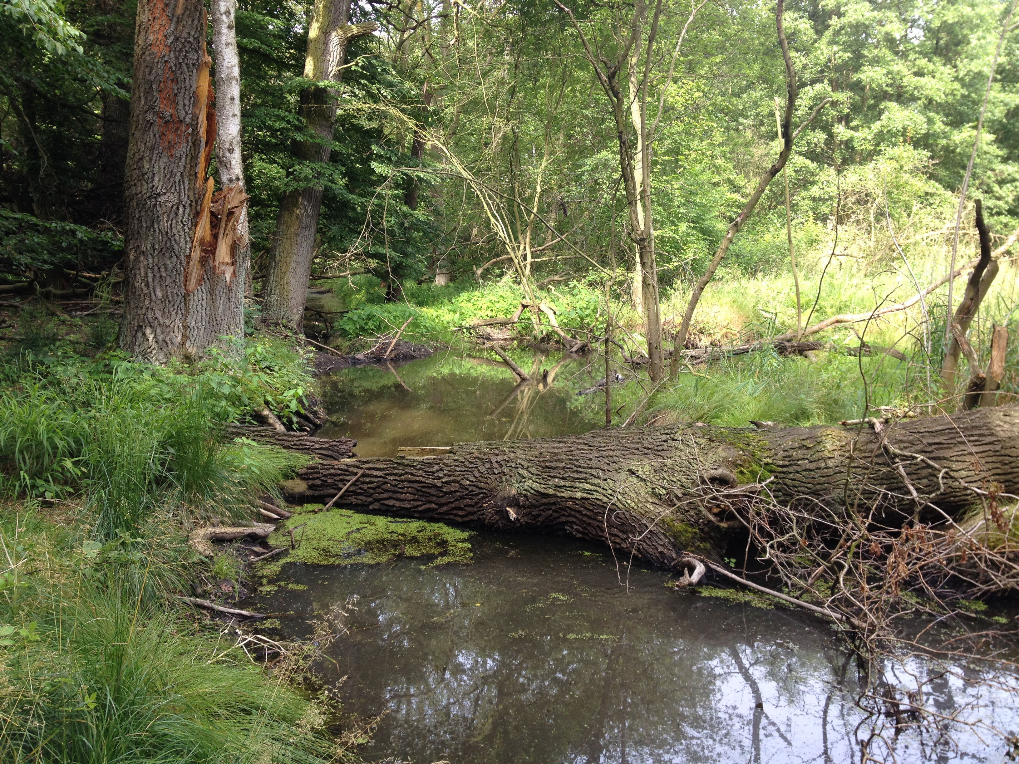 Jütrichauer Busch; Hakengraben im Juni